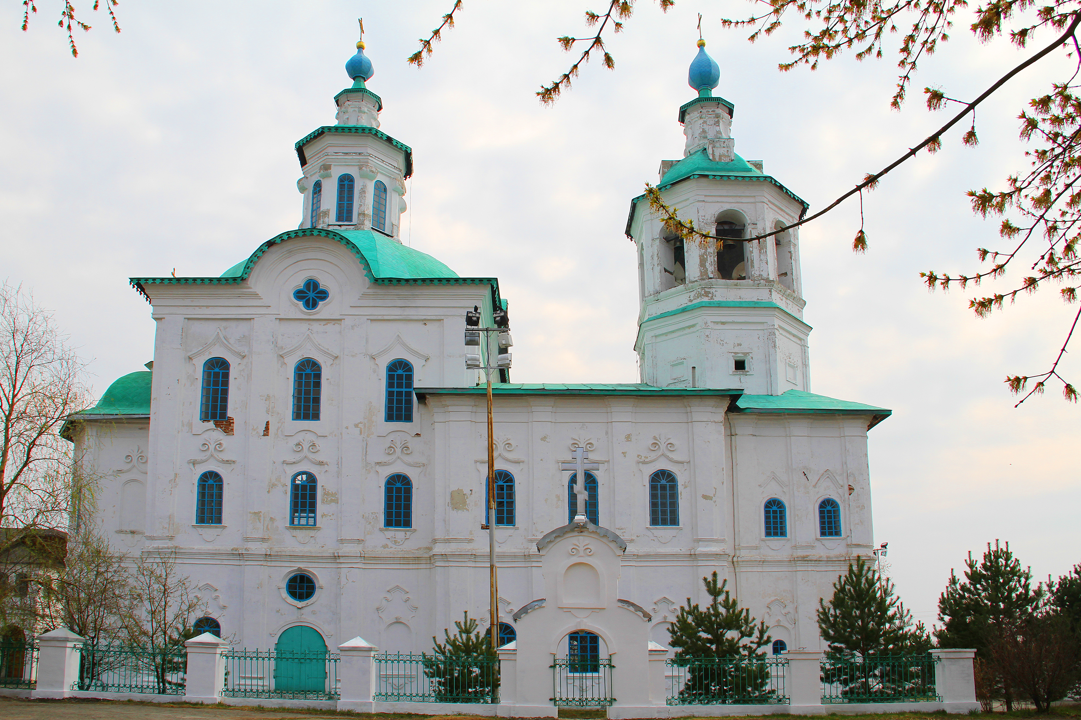 Богоявленский собор: улица Коркинского, 52, Ишим, Тюменская область